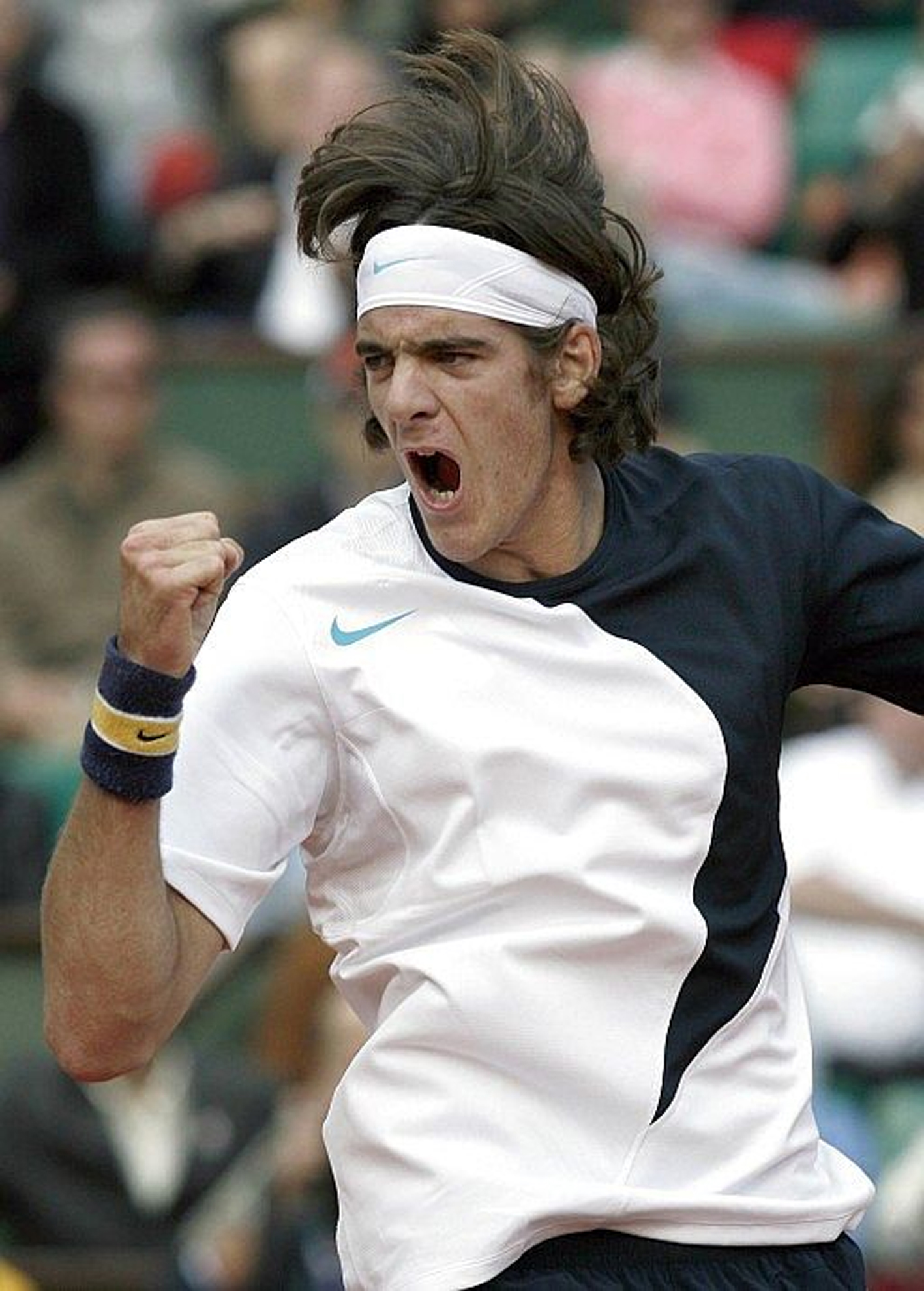 Juan Martin